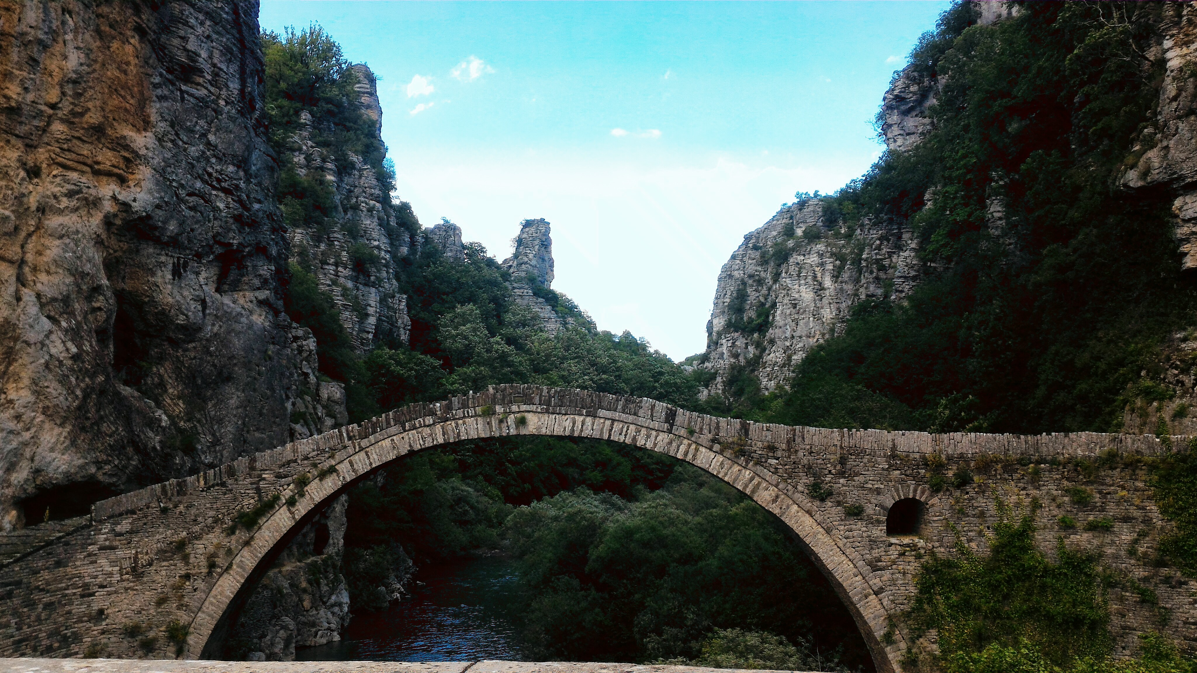 This is a photography of Natura 2000 protected area with ID Δρυμός Βίκου - Αώου Εθνικός Δρυμός Βίκου - Αώου